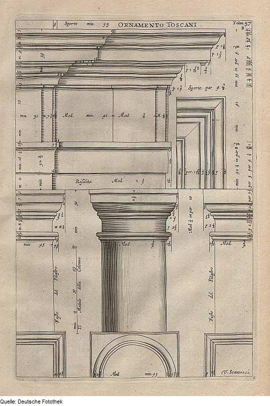 Original image description from the Deutsche Fotothek Architektur & Säule & Kapitell & Postament & Piedestal & Architrav & Gebälk & Fries